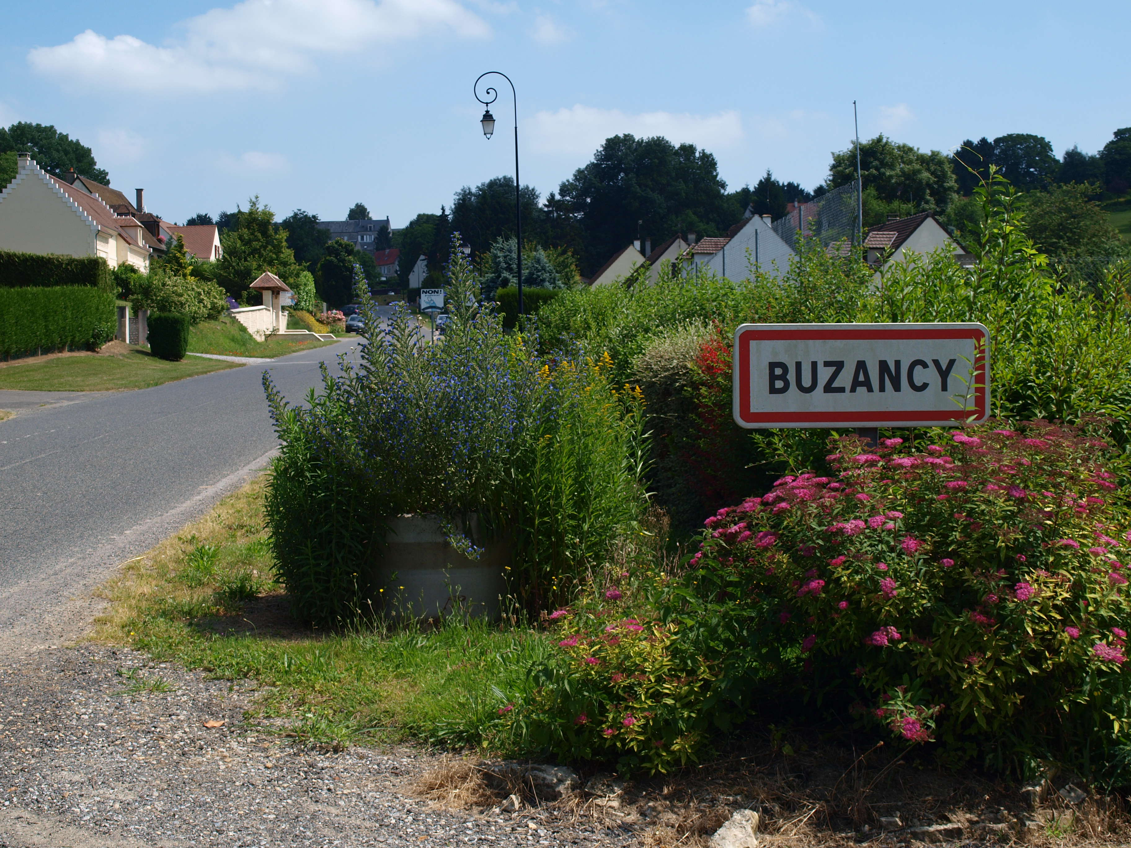 Buzancy (Aisne, France)